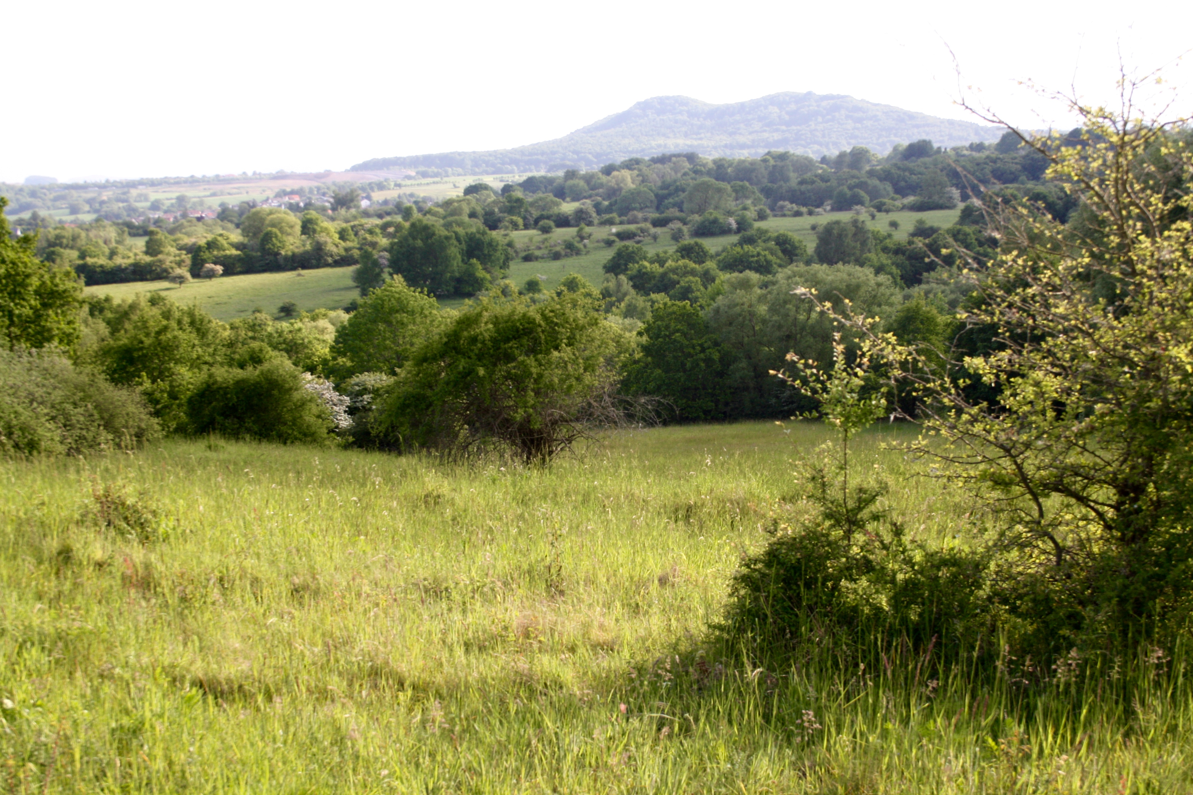 Blick über das Naturschutzgebiet Dönche im Südwesten von Kassel